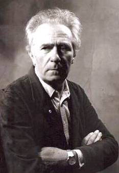 Foto del pittore Ettore FICO nel 1981